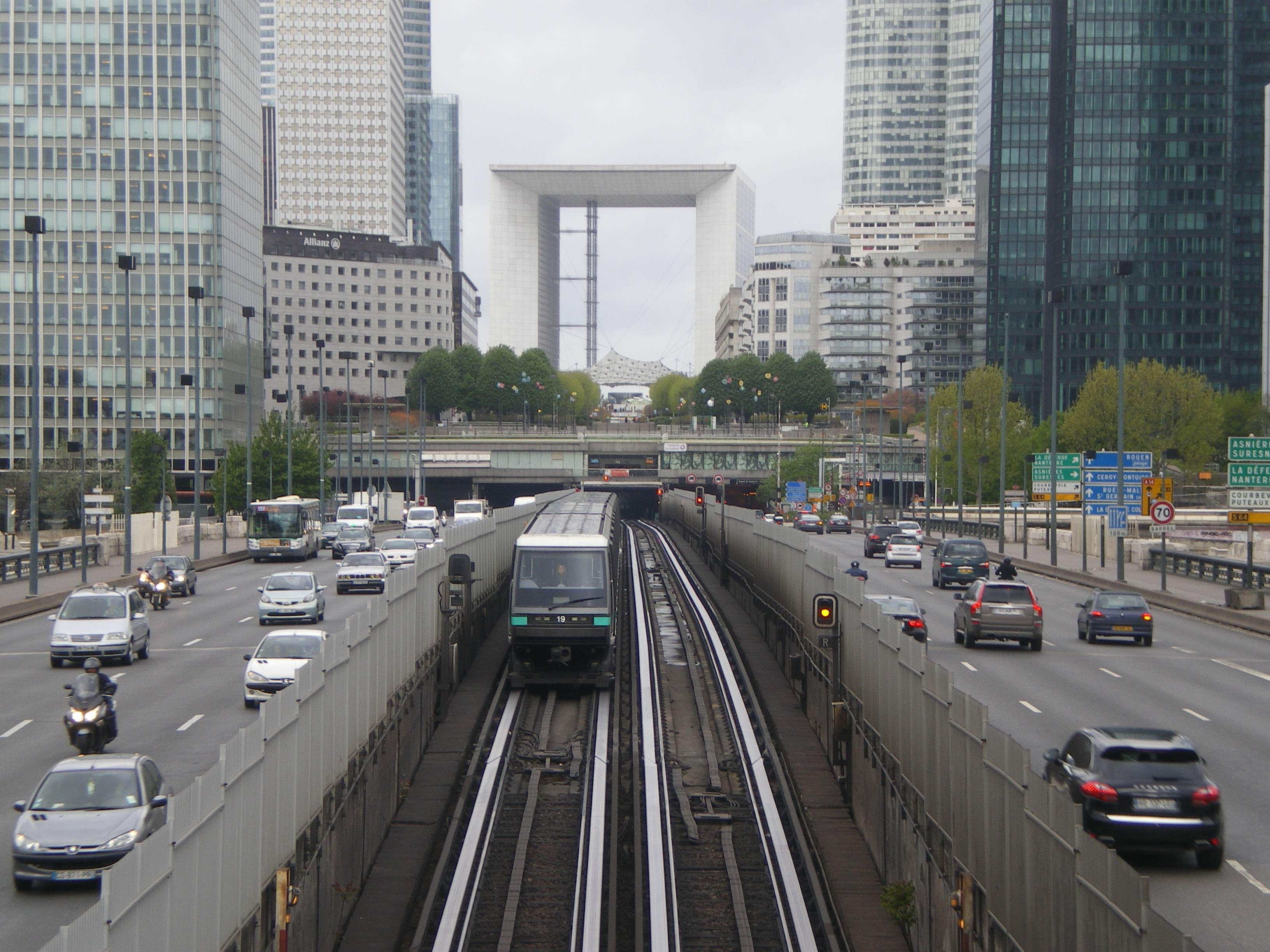 Pont de Neuilly , la grande Arche de la Défense et l'entrée du tunnel de Nanterre-la Défense